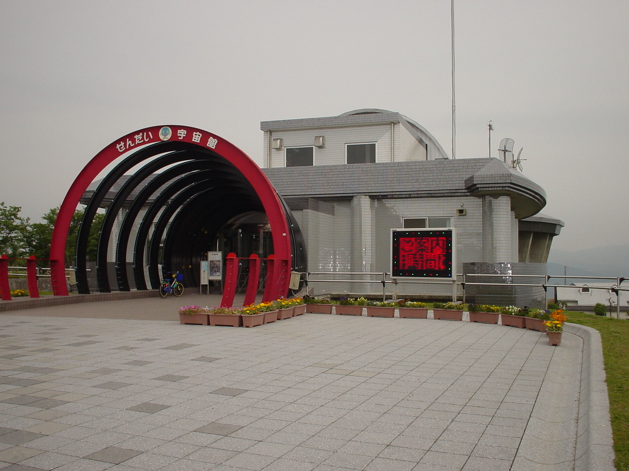 薩摩川内市せんだい宇宙館の外観。